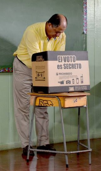 El presidente electo de Costa Rica, Luis Guillermo Solís para el periodo 2014-2018 mientras ejerce su derecho al voto.